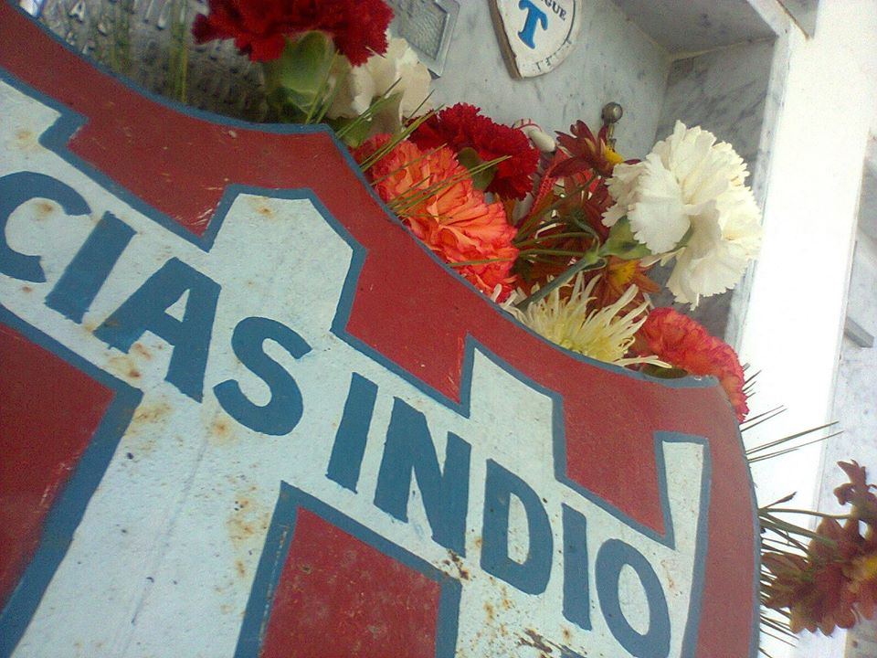 Hernán René Solari (Ingeniero Chanourdie, Santa Fe, Argentina; 27 de octubre de 1968 - cerca de Ingeniero Chanourdie, 28 de marzo de 1993) fue un futbolista argentino. Jugaba como mediocampista ofensivo o enganche, y su primer y único equipo fue Unión de Santa Fe. Es tristemente recordado por su temprano fallecimiento, a los 24 años, en un accidente mientras volvía a su casa en Ingeniero Chanourdie, junto a sus amigos Roli Fernández y Matías Ibarra, quienes también sucumbieron en el mismo suceso.1​